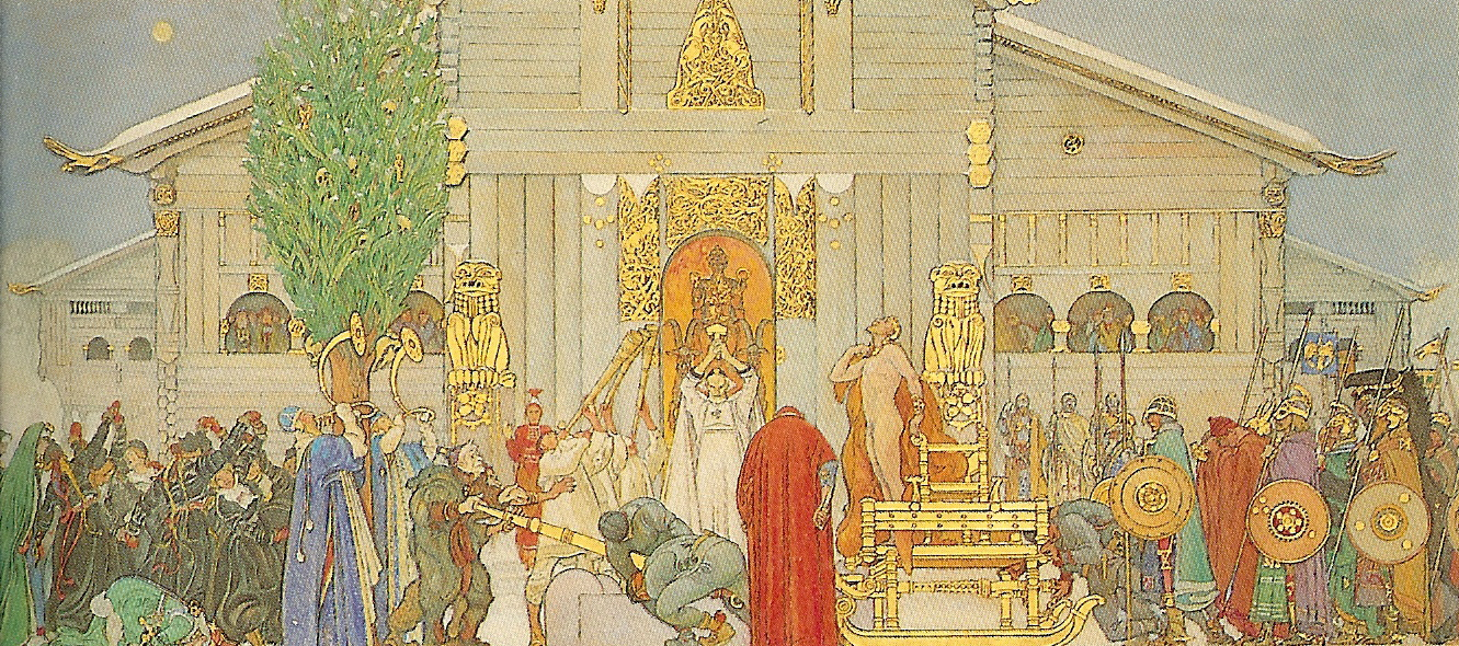 sketch